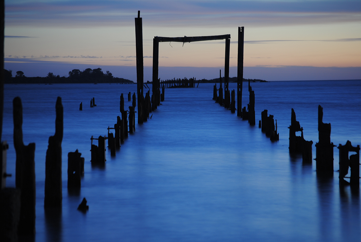 Antiguo Muelle de Embarcaciones que unían Buenos Aires con la Ciudad de Colonia del Sacramento